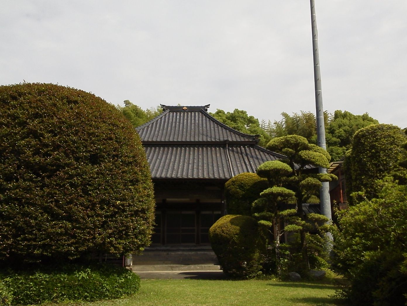 塔福寺（熊本県宇城市）